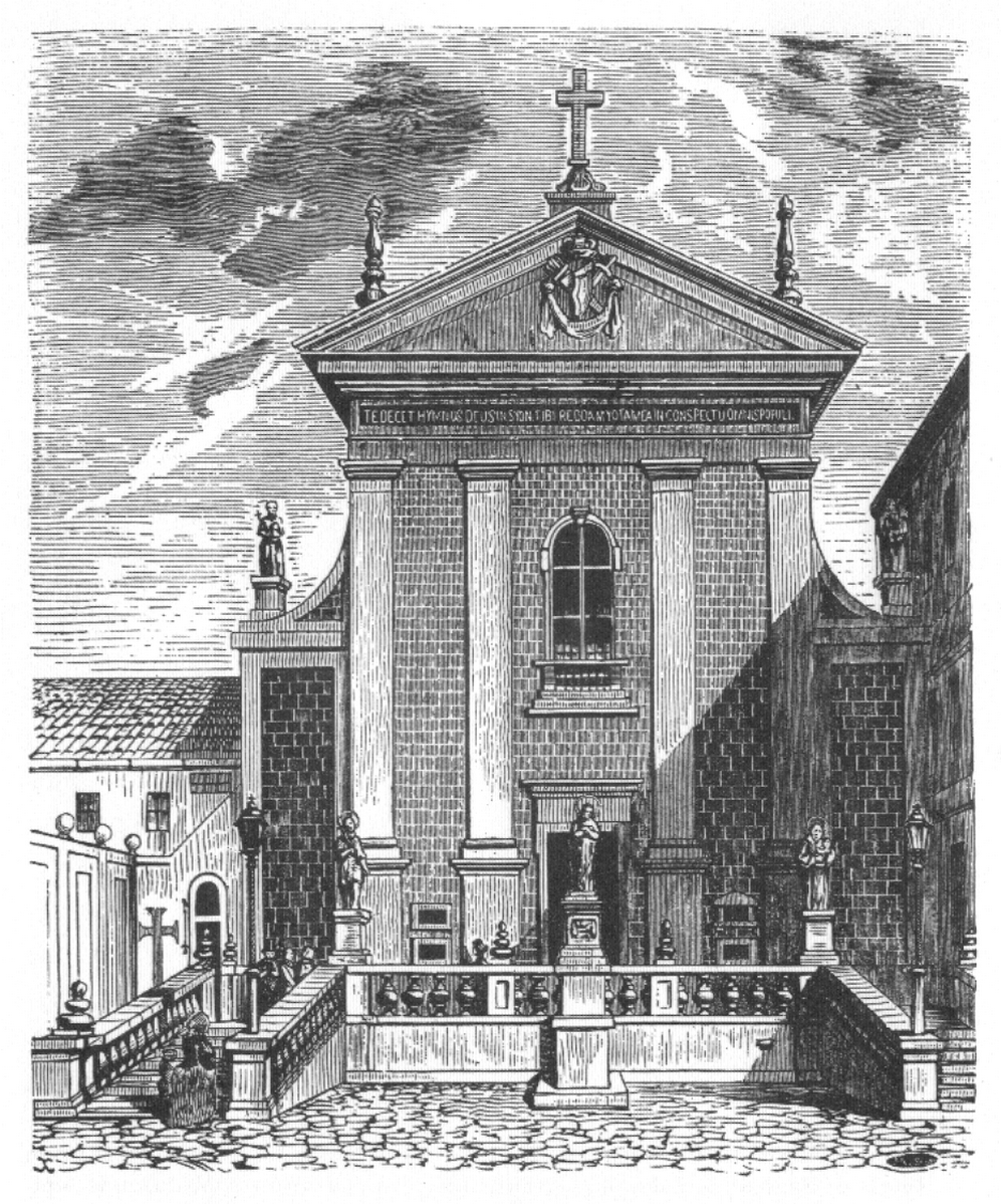 Warszawa, ul. Miodowa 13 - kościół Przemienienia Pańskiego (kościół Kapucynów). Powstał wraz z klasztorem w latach 1683-1694 z inicjatywy króla Jana III Sobieskiego jako wotum dziękczynne za zwycięstwa w bitwach pod Chocimiem i pod Wiedniem.